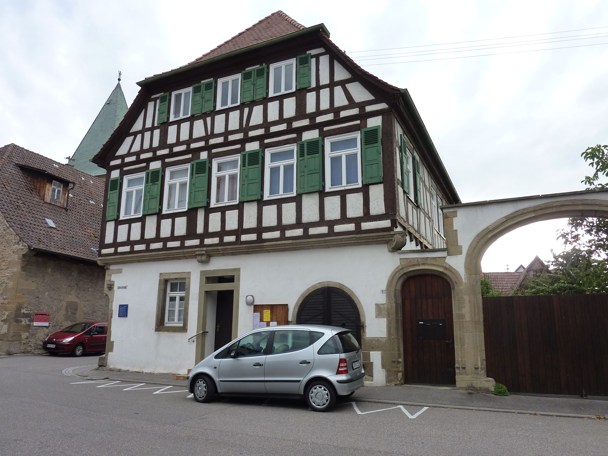 Pfarrhaus in Pleidelsheim